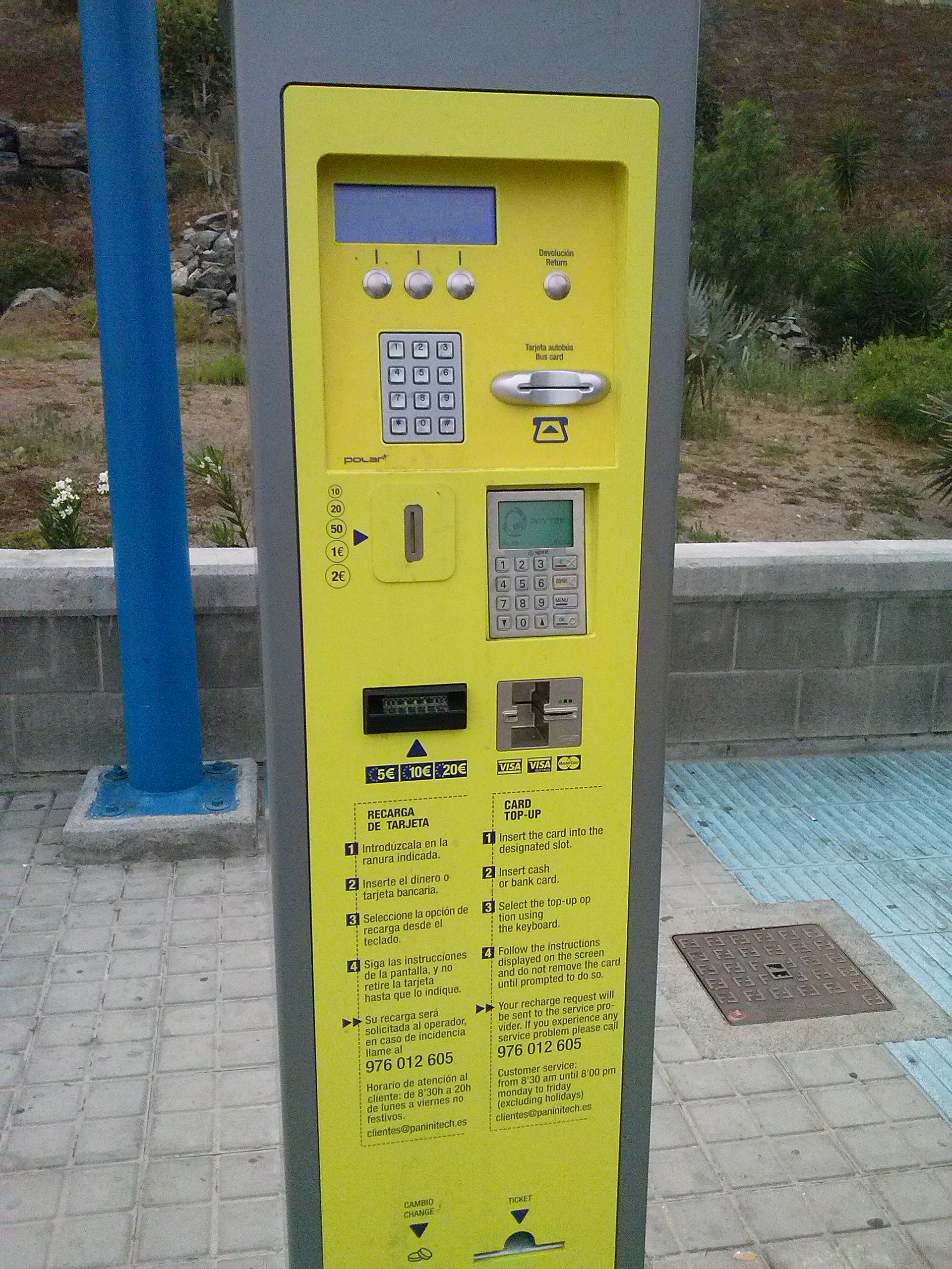 Una de las máquinas en Las Palmas de Gran Canaria para recarga y obtención de la tarjeta LPAMovilidad de la empresa Guaguas Municipales.